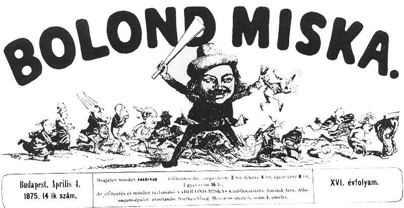 A Bolond Miska fejléce, 1875